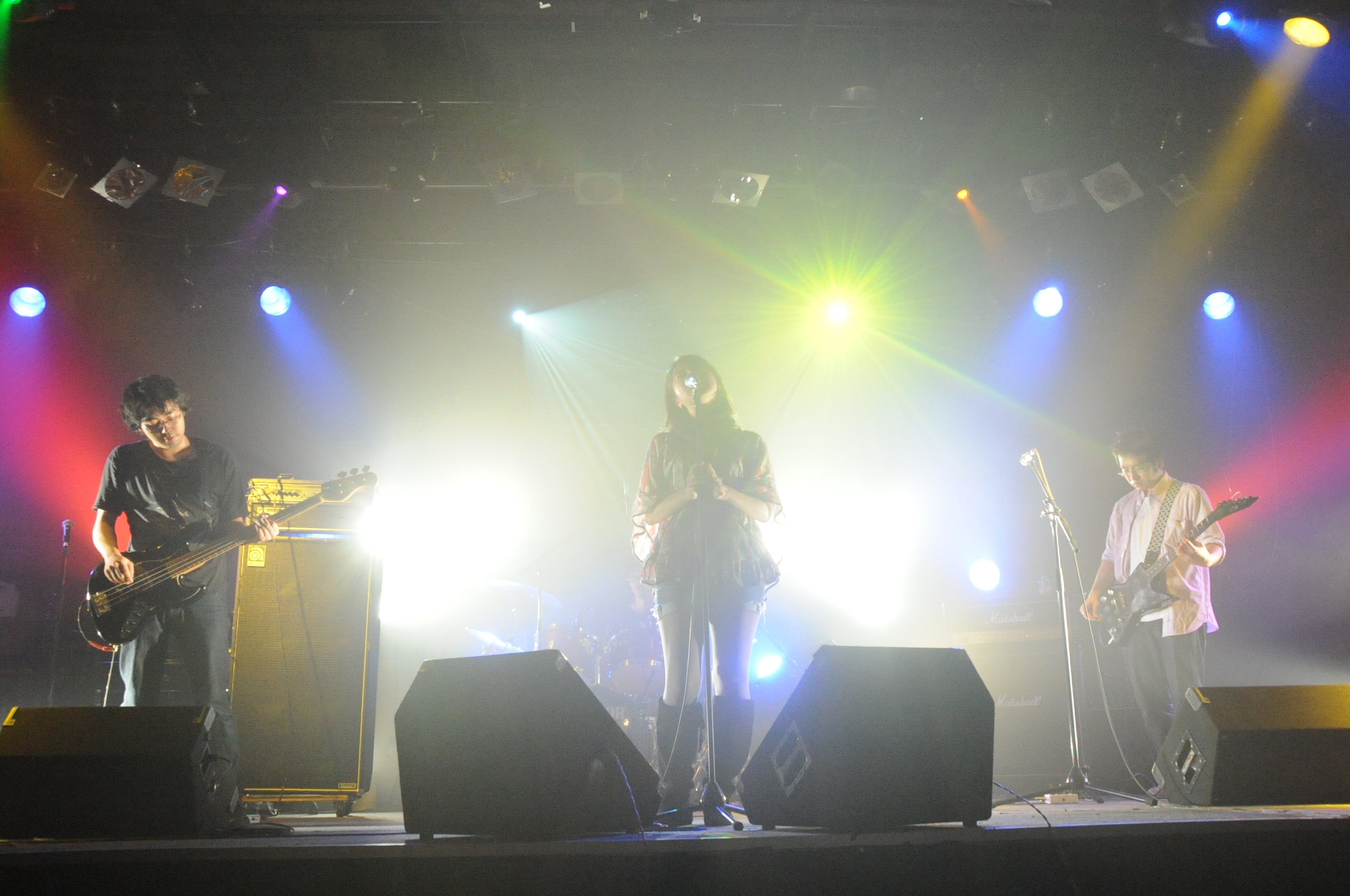 地下 ＫＭＡパラダイスホール